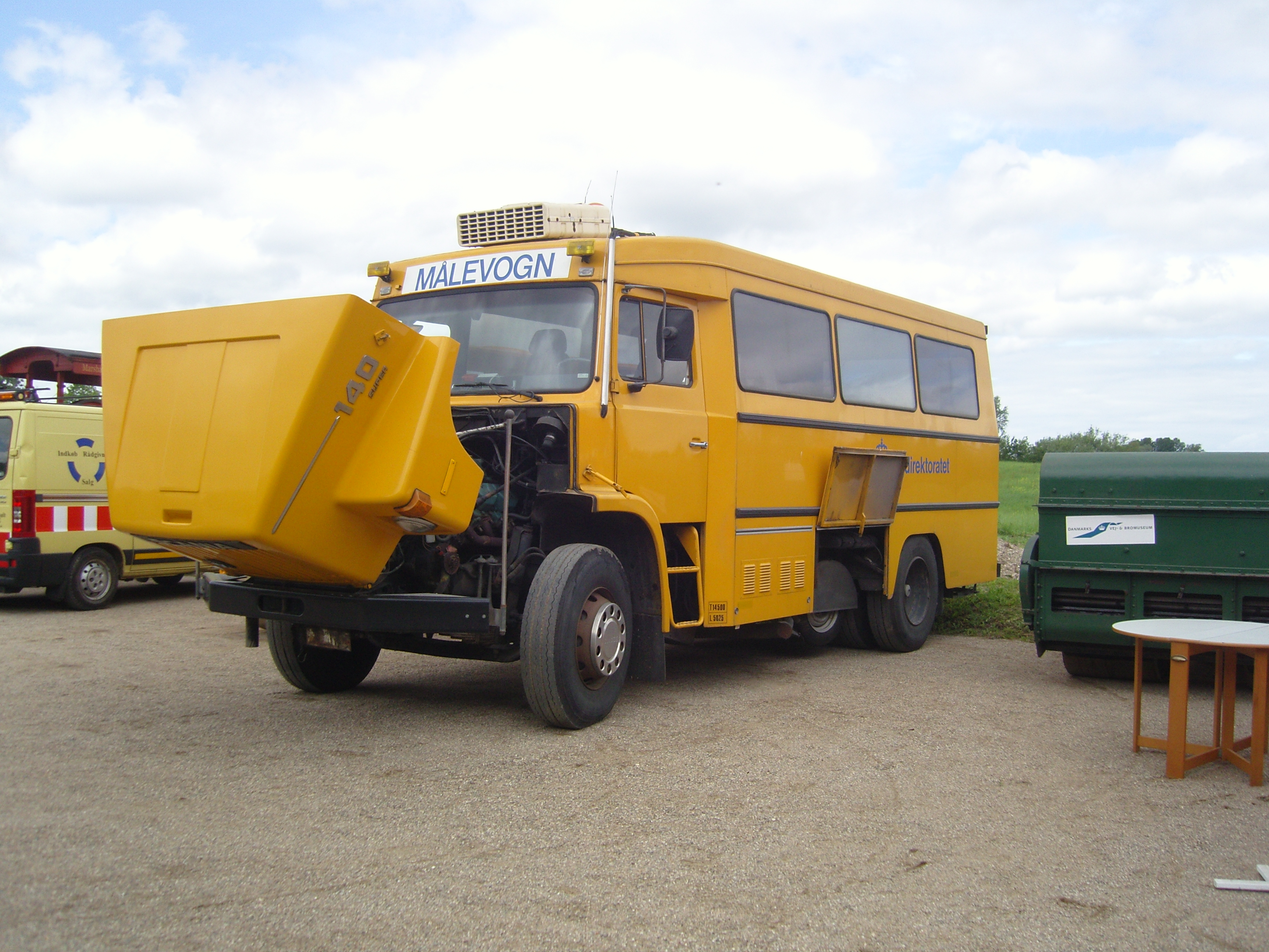 Stradograf - køretøj til måling af vejfriktion